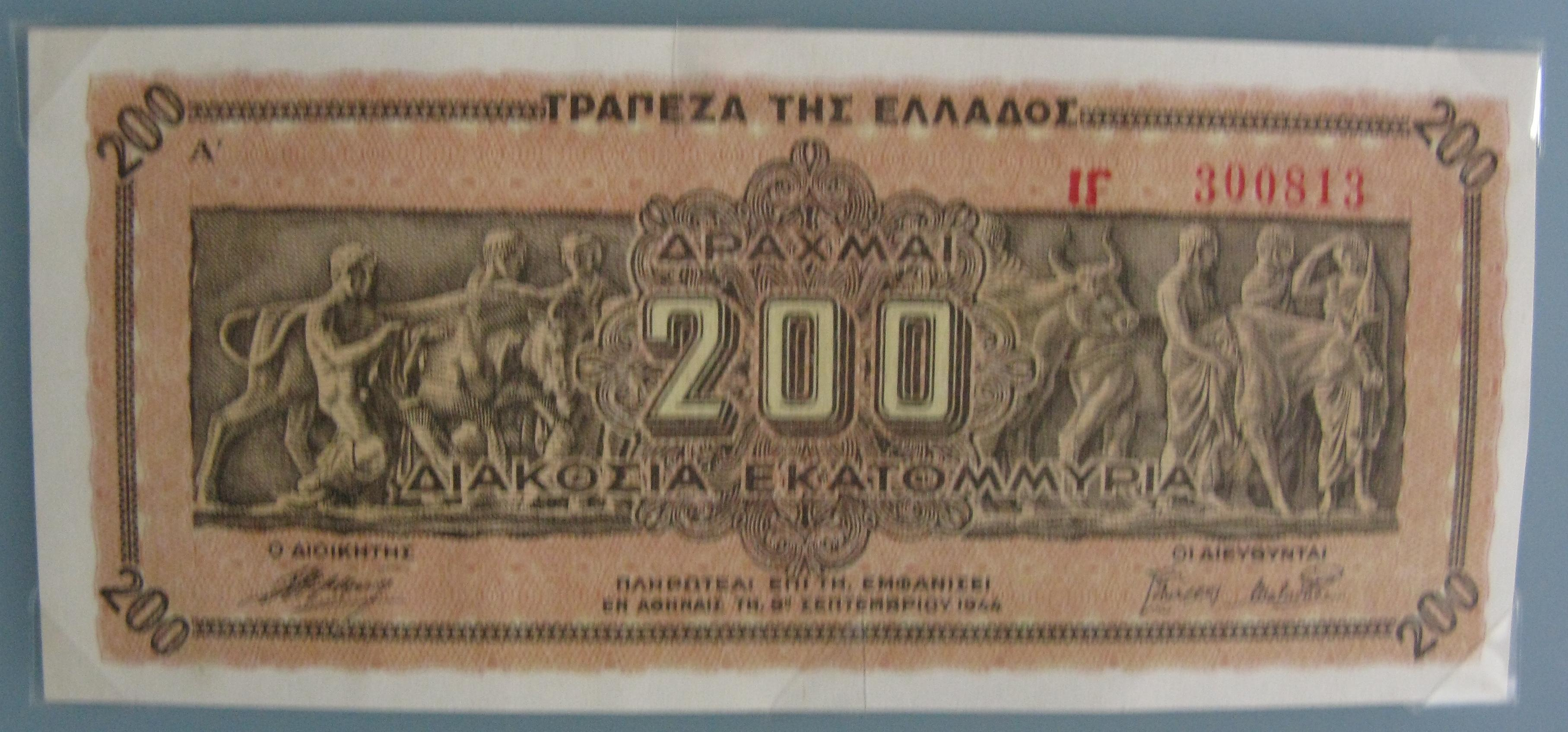 Numismatic Museum, Athens, Greece. --- 200 Εκατομμύρια Δραχμαί Νομισματικό Μουσείο, Αθήνα.